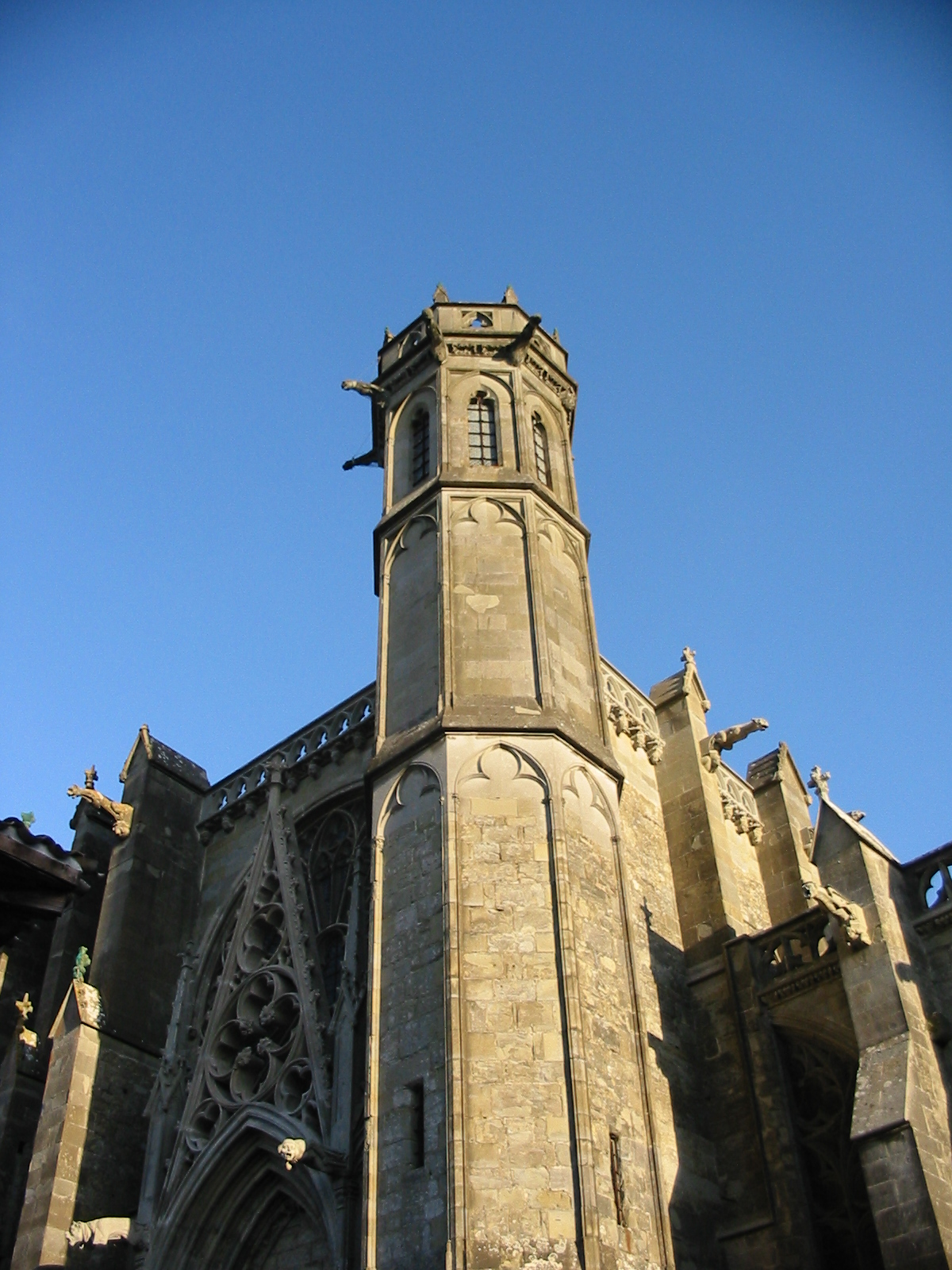 Cathédrale de la cité de Carcassonne. Auteur:Pereubu (